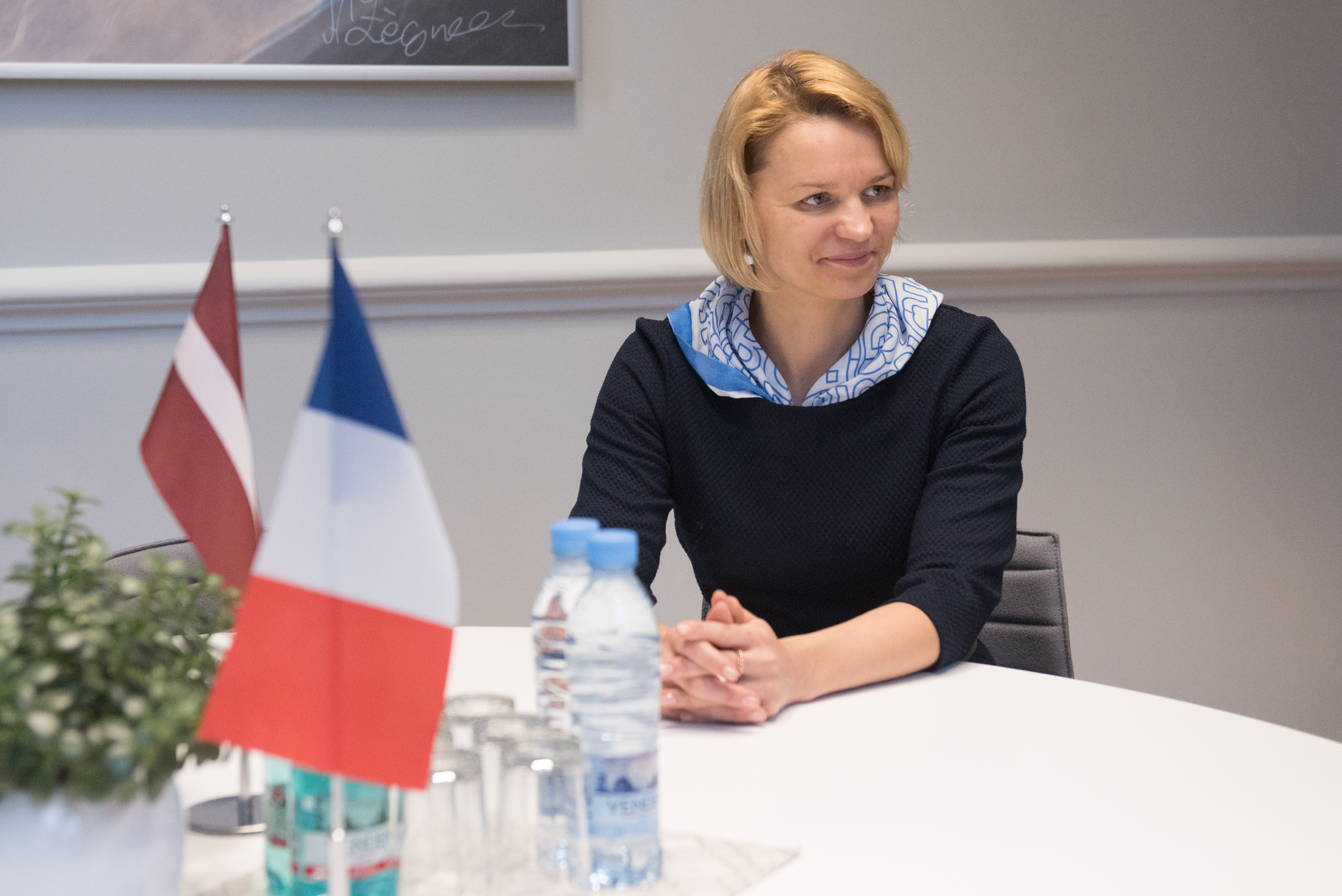 2018.gada 2.februāris. Saeimas Eiropas lietu komisijas priekšsēdētājas Lolitas Čigānes tikšanās ar Francijas Republikas ārkārtējo un pilnvaroto vēstnieci Latvijas Republikā Odili Supizonu (Odile Soupison). Foto: Ieva Ābele, Saeima Izmantošanas noteikumi: saeima.lv/lv/autortiesibas